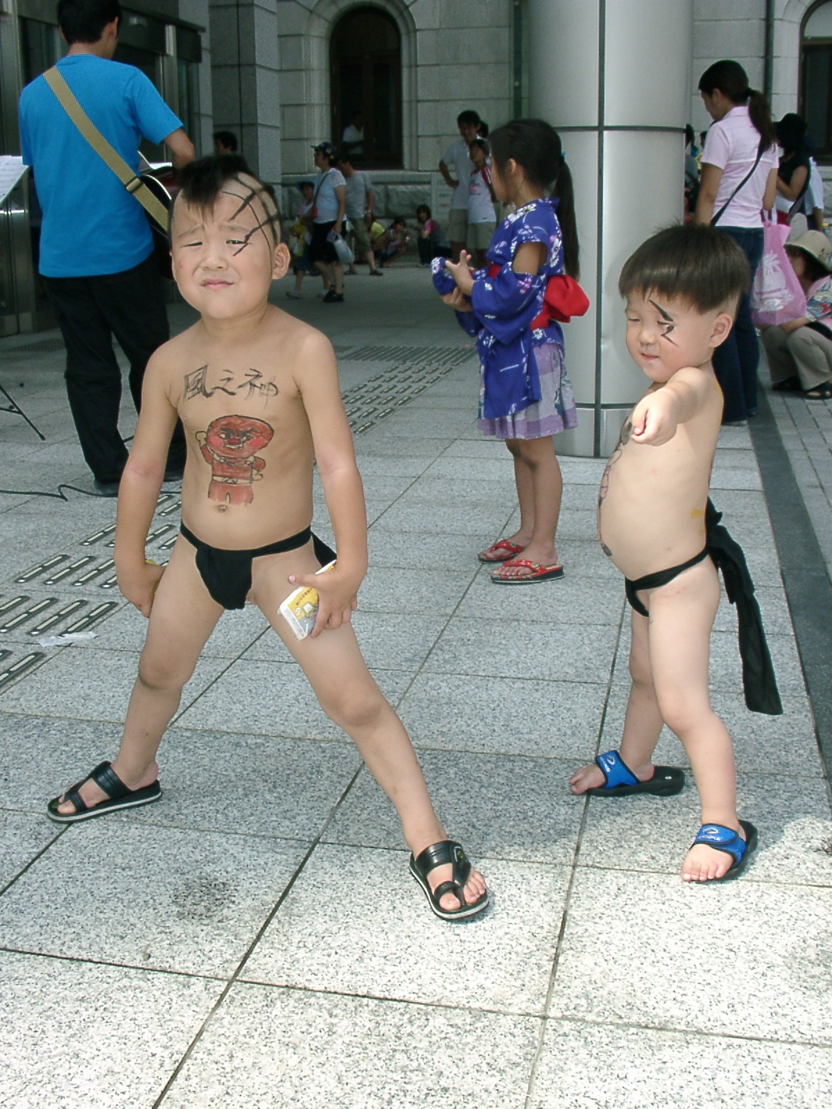 fundoshi boys